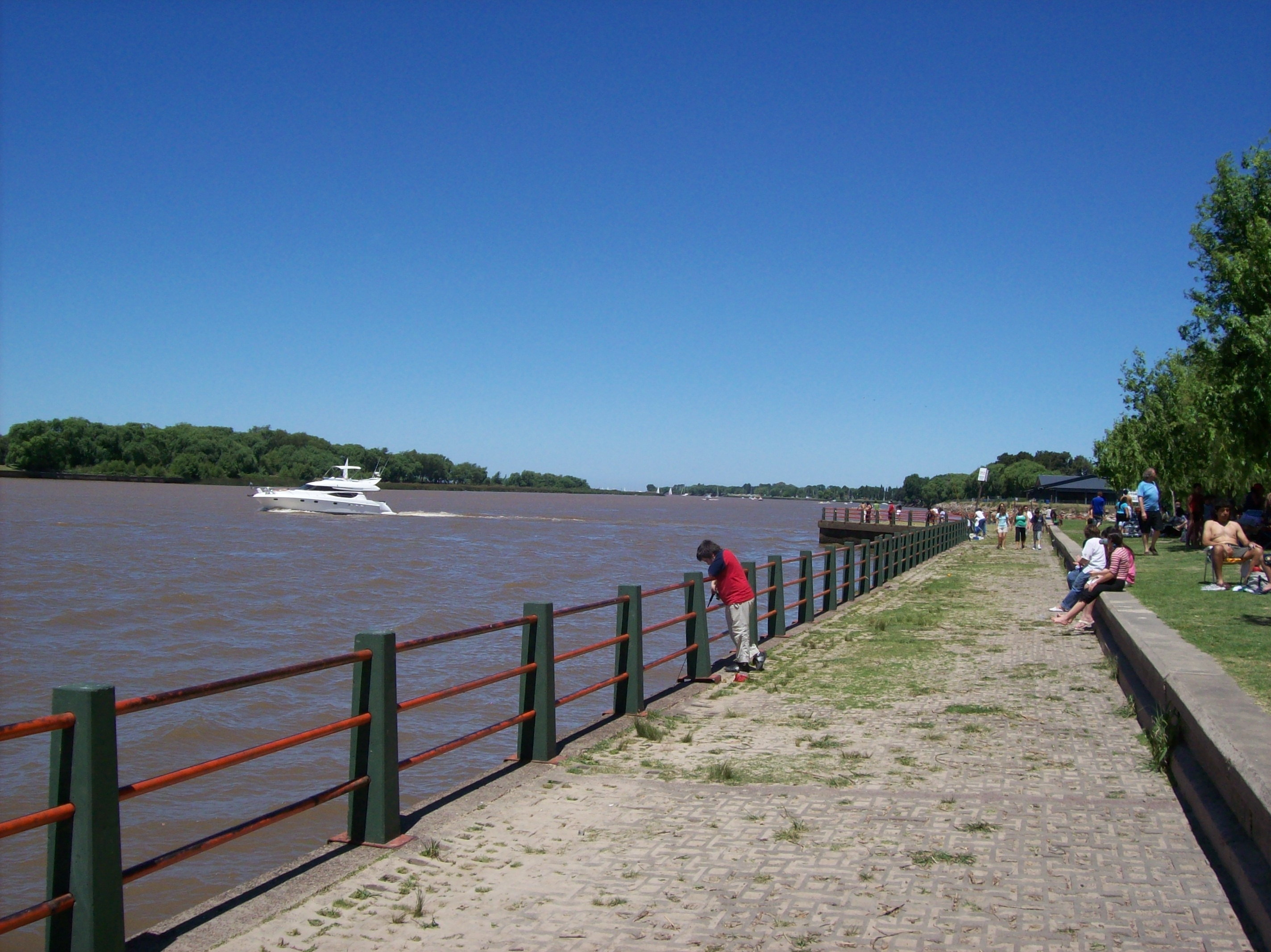 Costanera municipal de San Fernando, Provincia de Buenos Aires, Argentina.